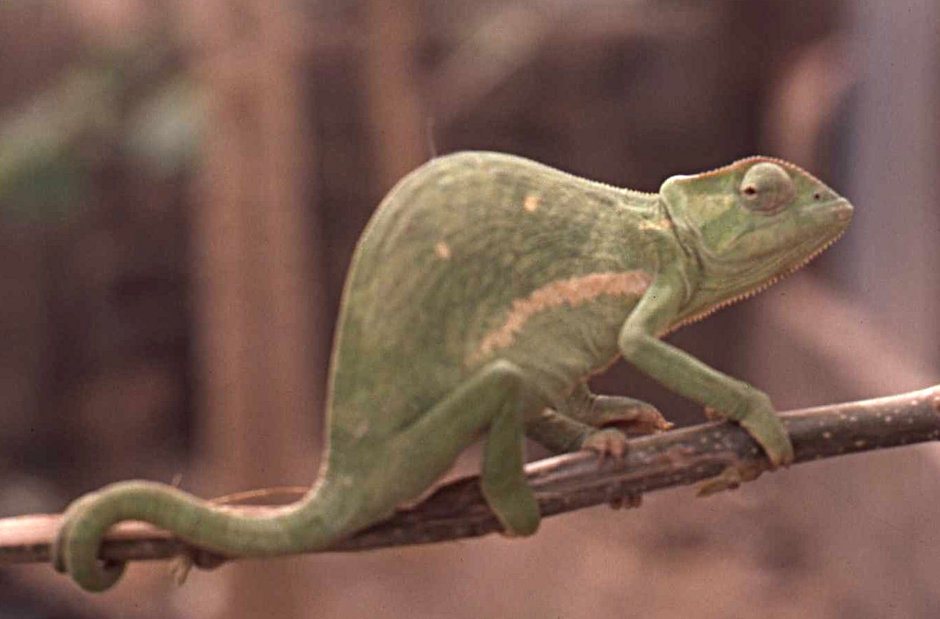 Caméléon au nord de la Cote d'Ivoire